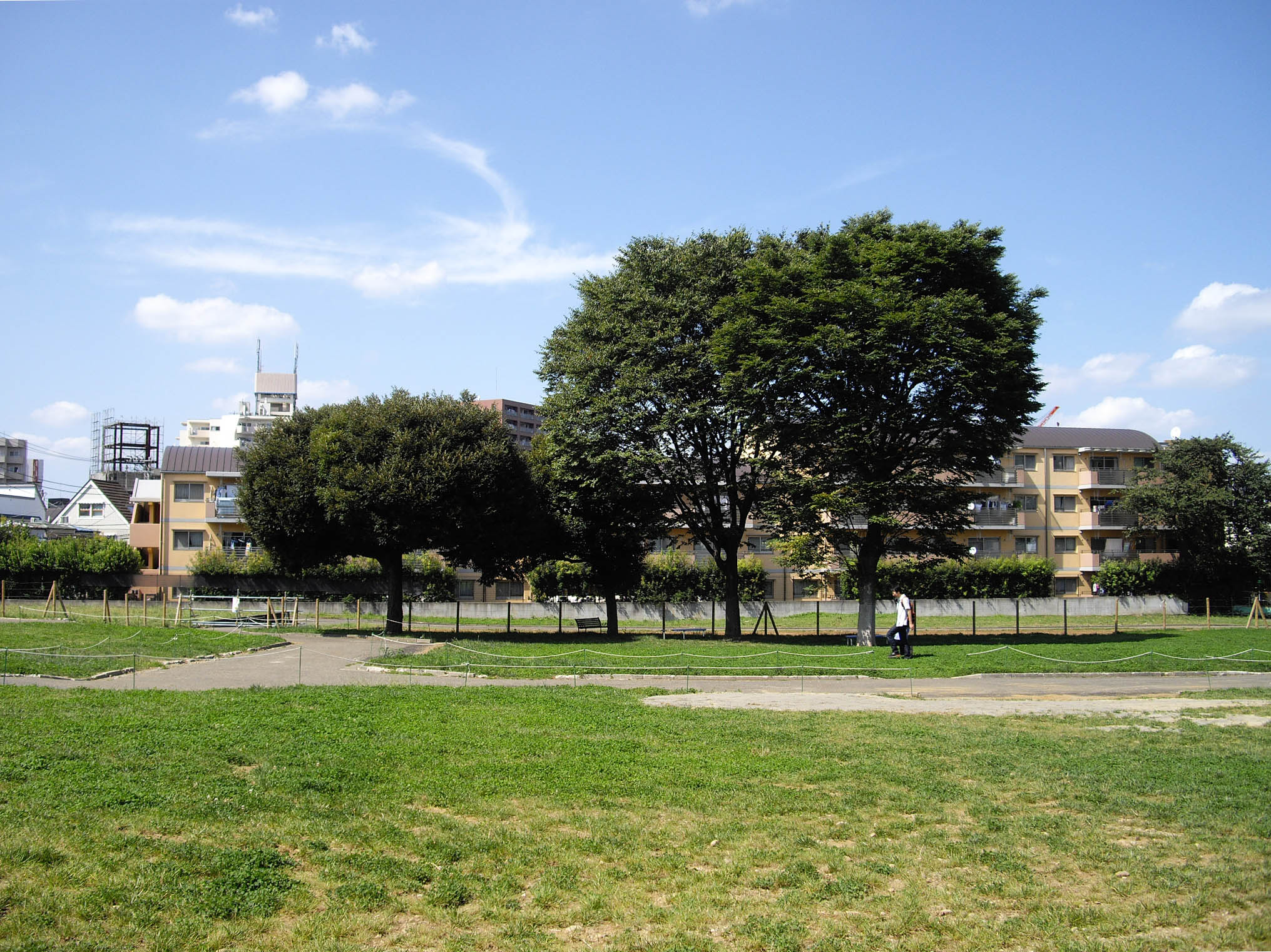 世田谷区立池尻二丁目広場